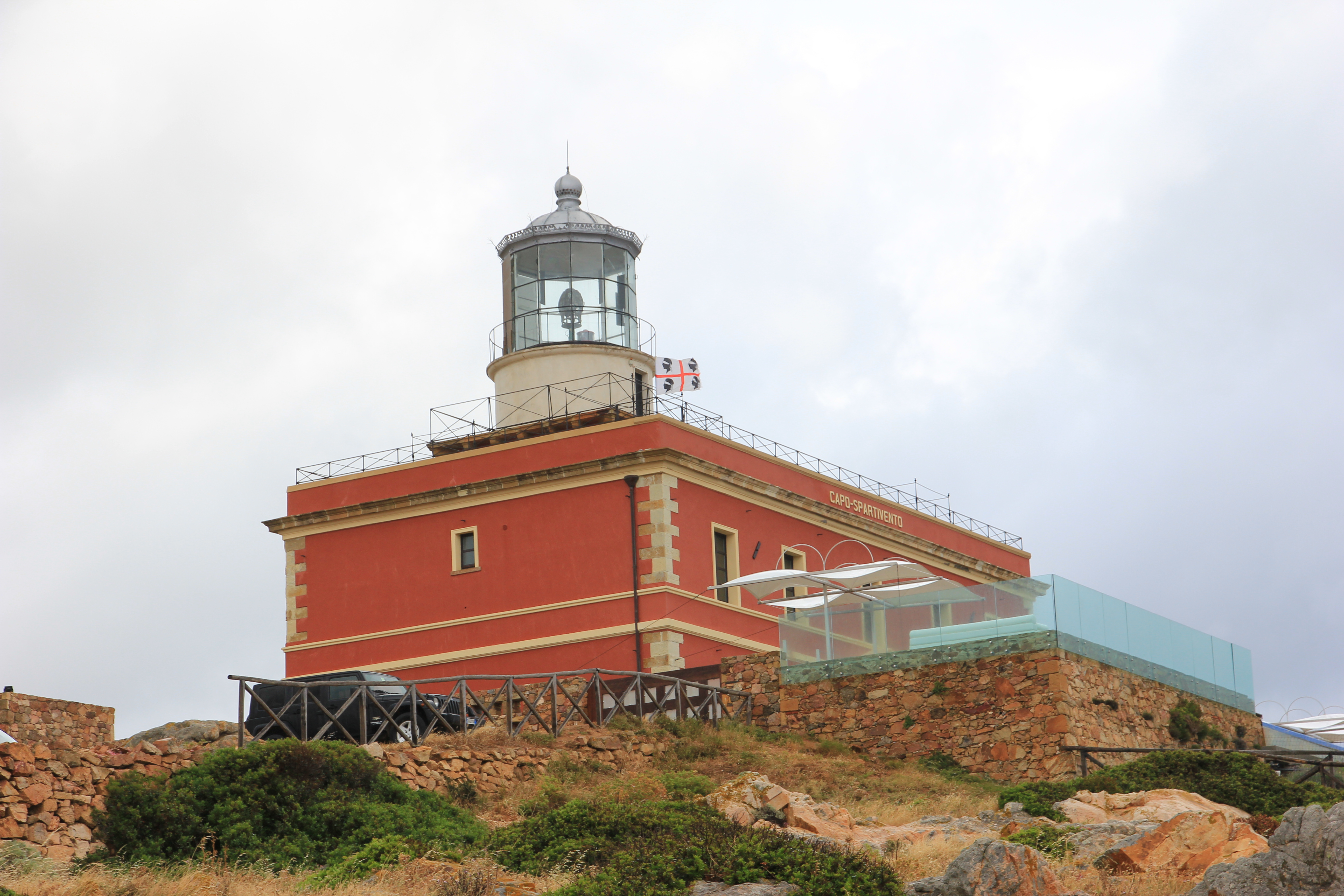 Domus de Maria - Faro di Capo Spartivento